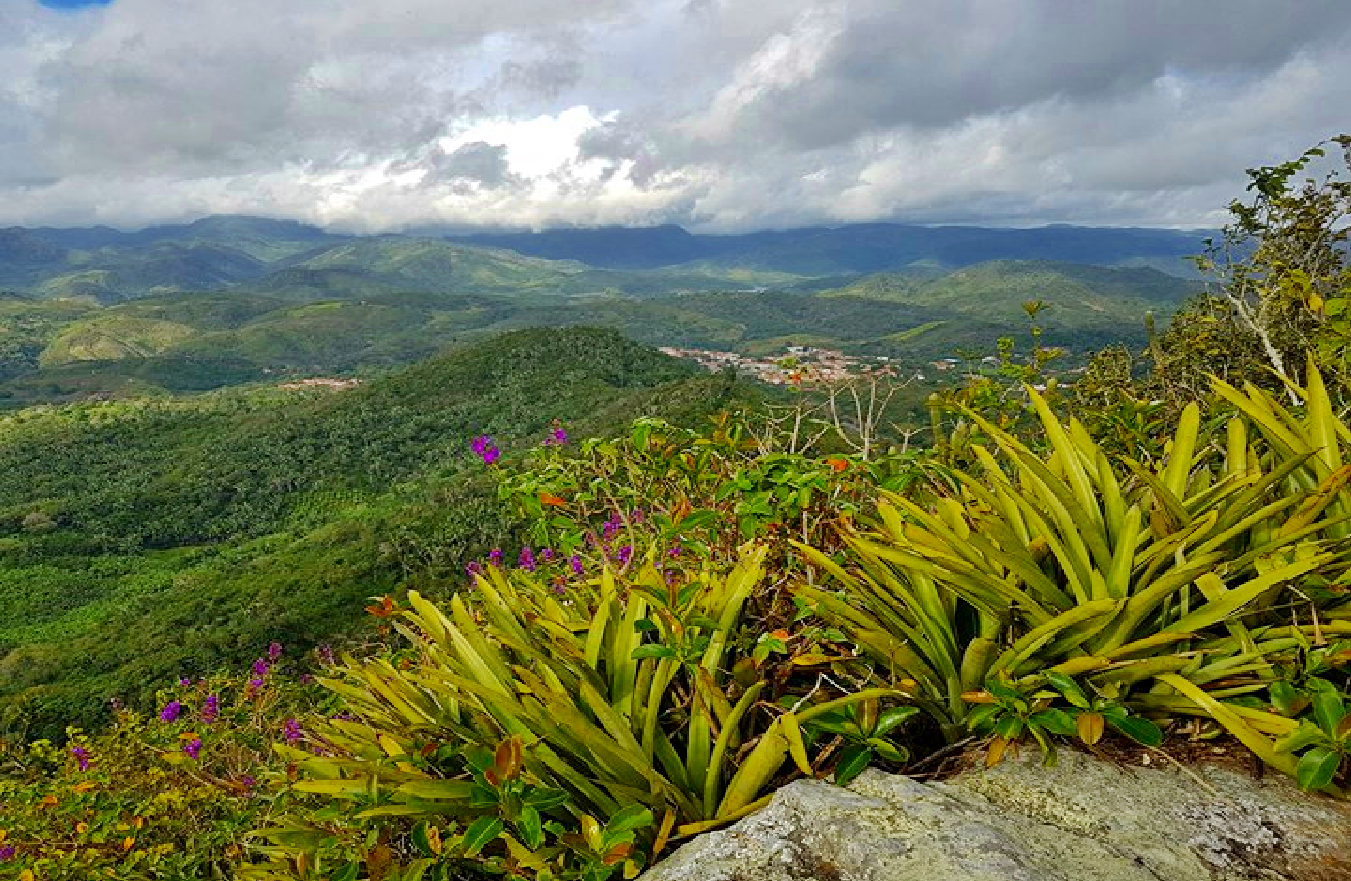 Torre da Lua